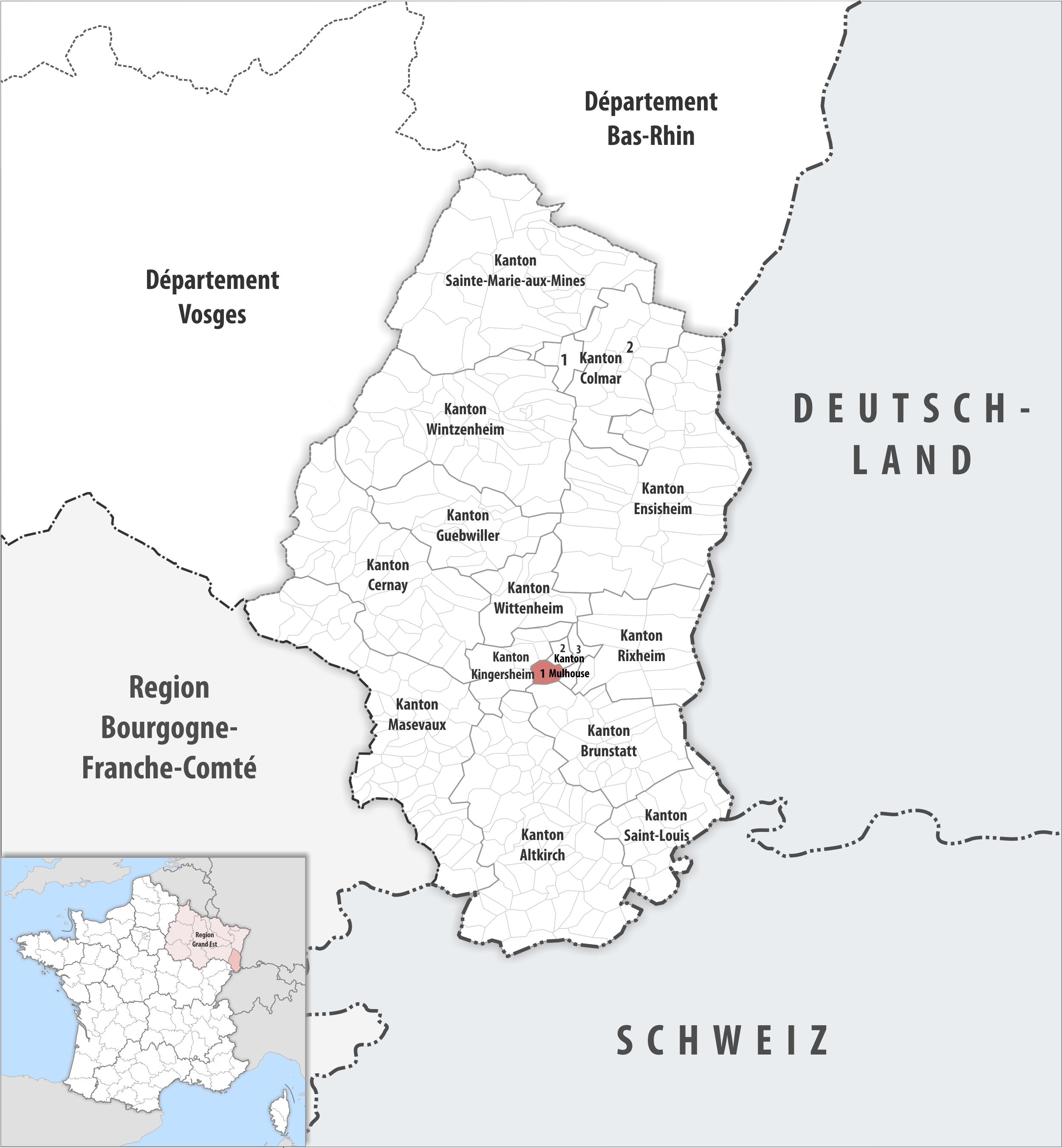 Lage des Kantons Mulhouse-1